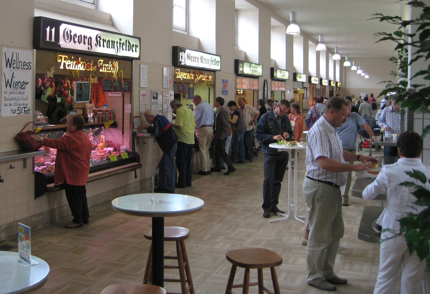 Die "Fleischhalle" auf dem Augsburger Stadtmarkt